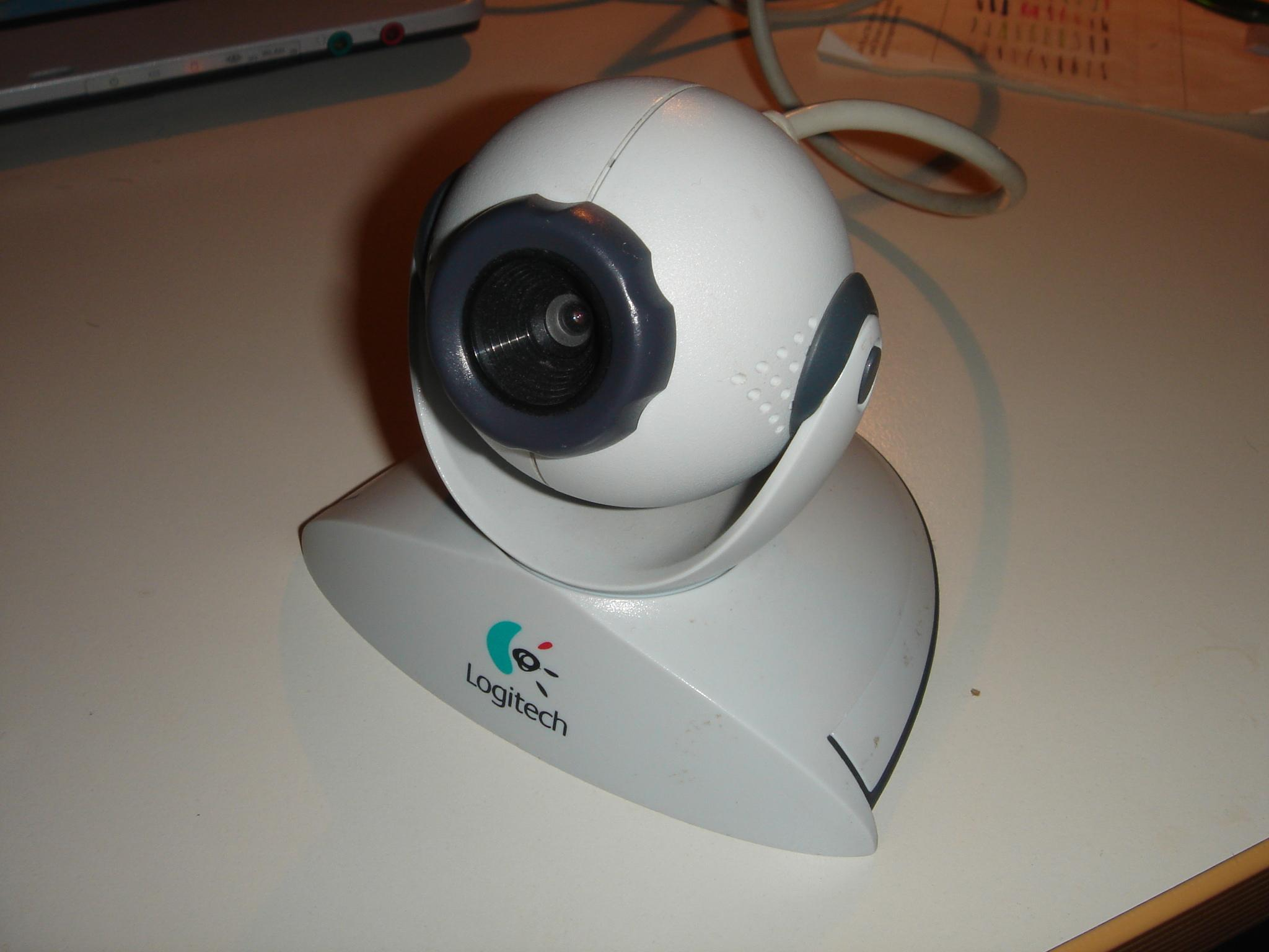 Logitech QuickCam Pro, dunkler Fokusring